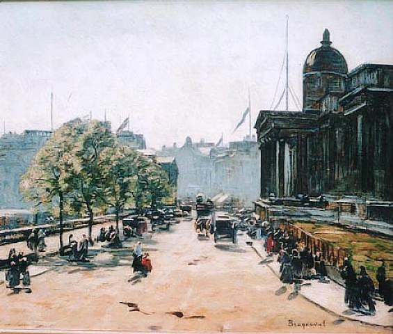 The National Gallery, Trafalgar Square, huile sur toile de Louis Braquaval (1854-1919), 38,1 x 45,7 cm. Collection particulière.